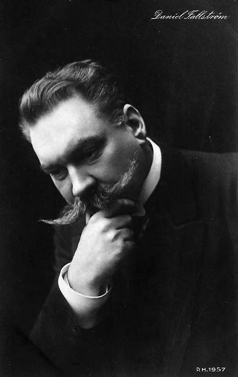 Daniel Fallström